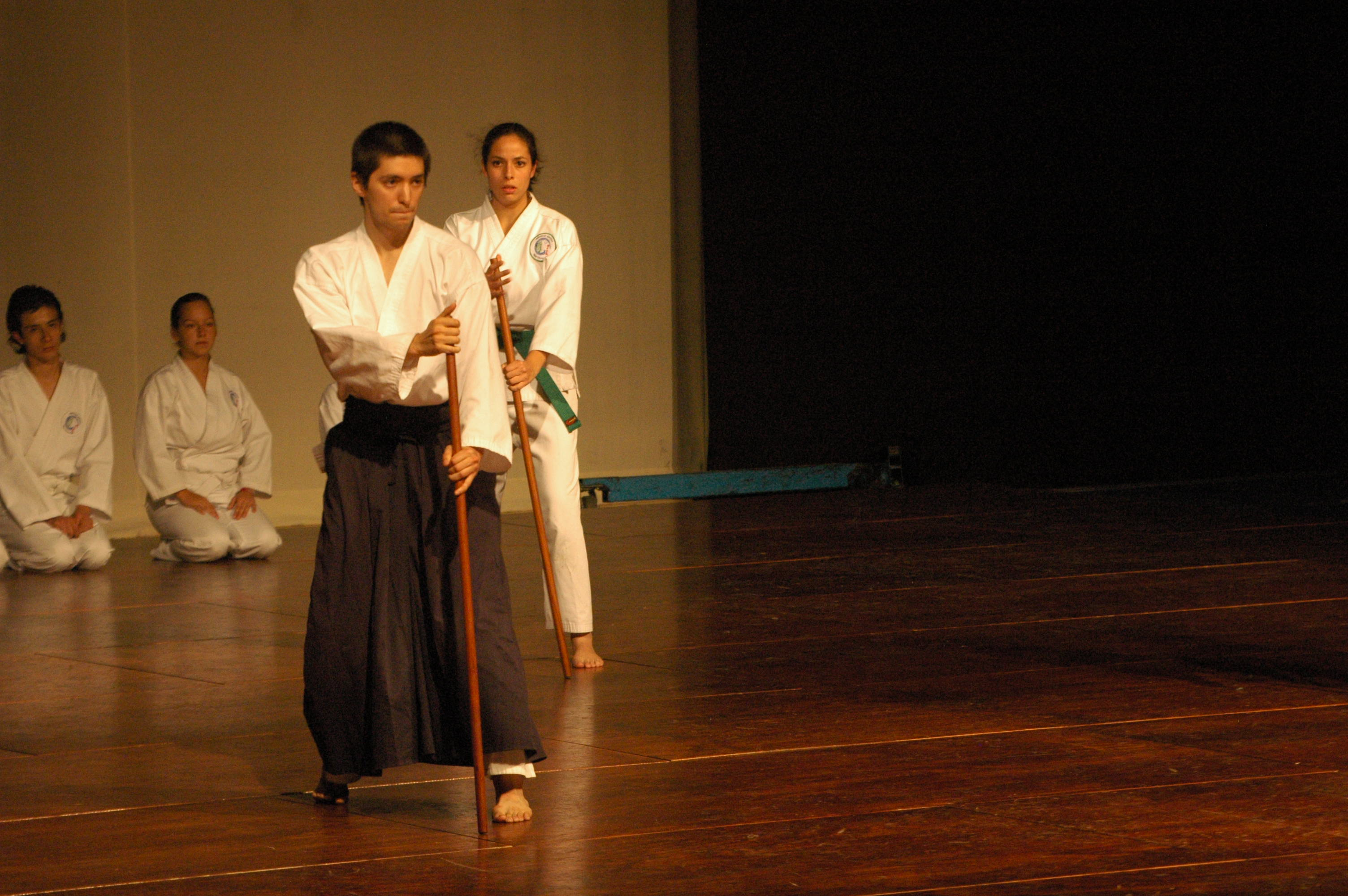 Demostración de Aikido durante el evento Semana de la Cultura en ITESM Campus Ciudad de México